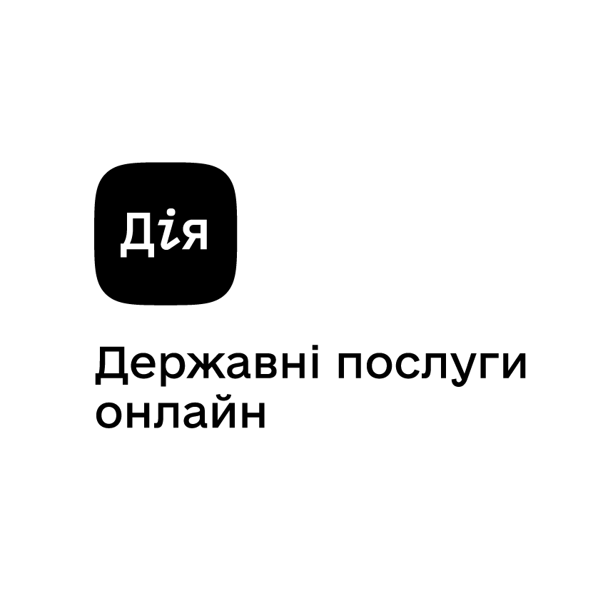 Logo of ukrainian government services online app Diia